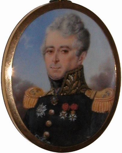 Portrait en médaillon du Général Charles Treillard, (vers 1815)